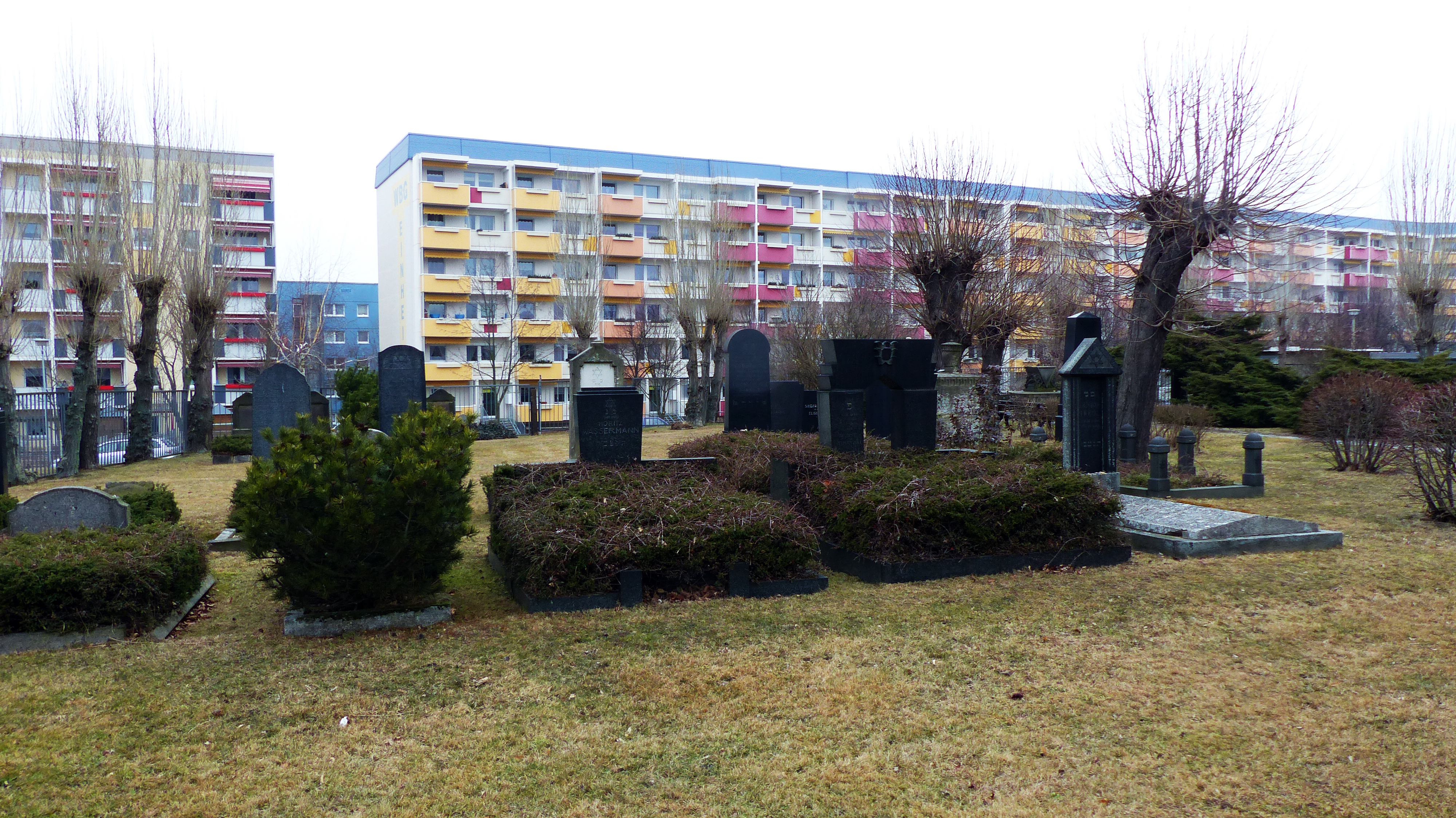 Jüdischer Friedhof, Gesundbrunnen (Bautzen) Hornjoserbsce: Židowske pohrjebnišćo w Budyskej Strowotnej studni.